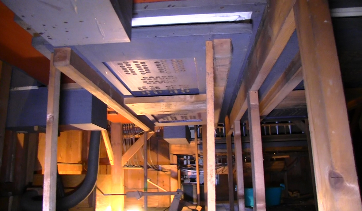 Einer der beiden, seit dem Einbau der elektrischen Windversorgung (1935) blockierten Schöpfbälge unter dem Magazinbalg der Strebel-Orgel in St. Michael zu Stadtsteinach (Ansicht von Norden)